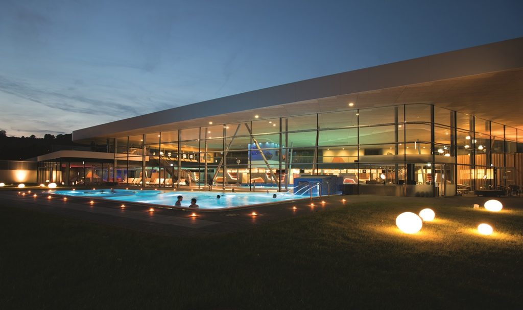 Ansicht Emser Therme